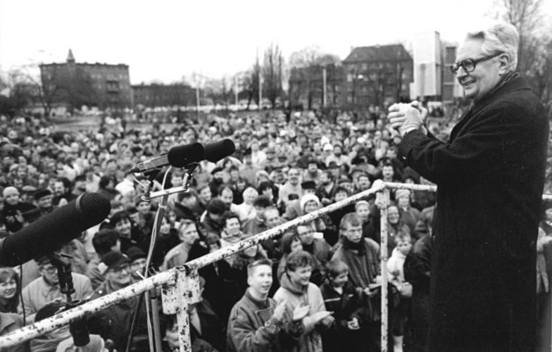 ADN-ZB Oberst 1.3.90 Oranienburg: An einer Wahlkundgebung der SPD der DDR nahm der Vorsitzende der SPD der BRD, Dr. Hans-Jochen Vogel, teil. Er sprach vor einigen Tausend Bürgern der Kreisstadt vor den Toren Berlins.